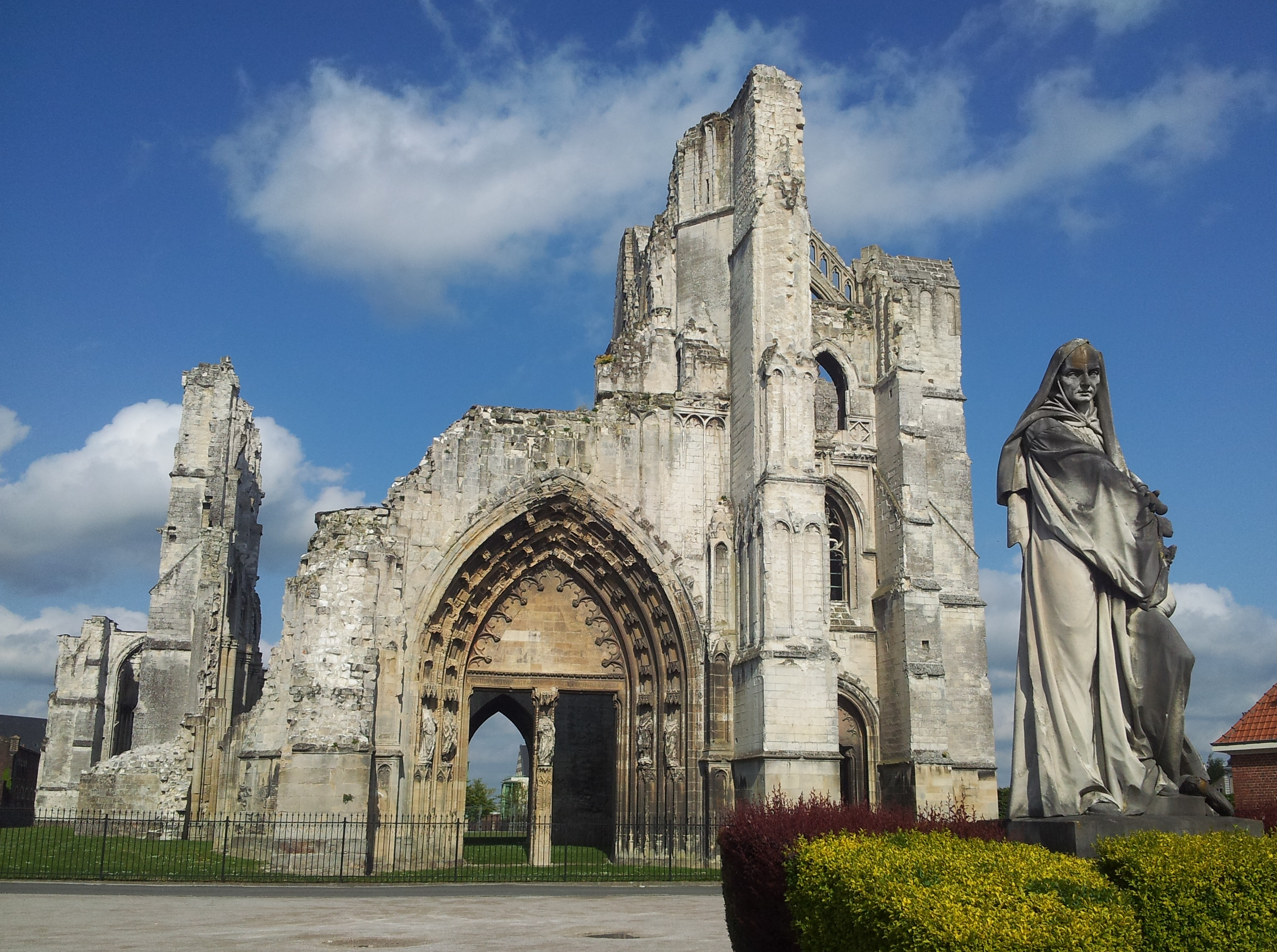 Ruine de l'Abbaye Saint-Bertin à Saint-Omer. (France), détruite en 1830.